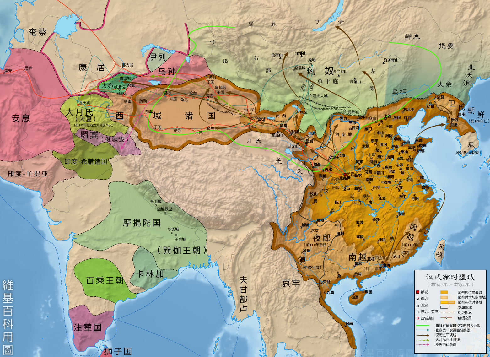 汉武